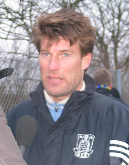 Michael Laudrup. Optaget efter træningskamp på Værløse Stadion.